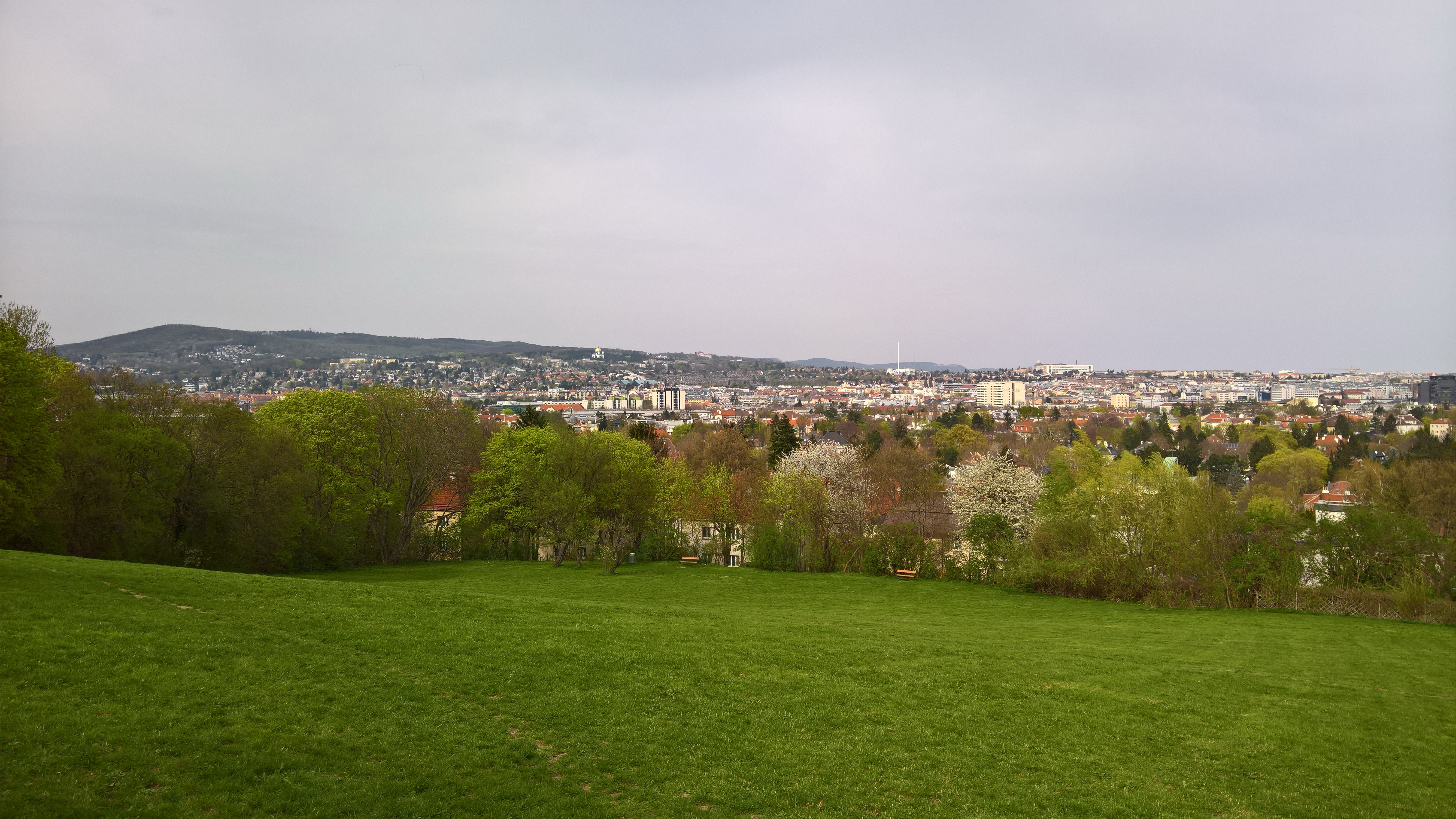 Blick vom Nordhang des Roten Berges in Richtung des 14. Wiener Gemeindebezirkes Penzing